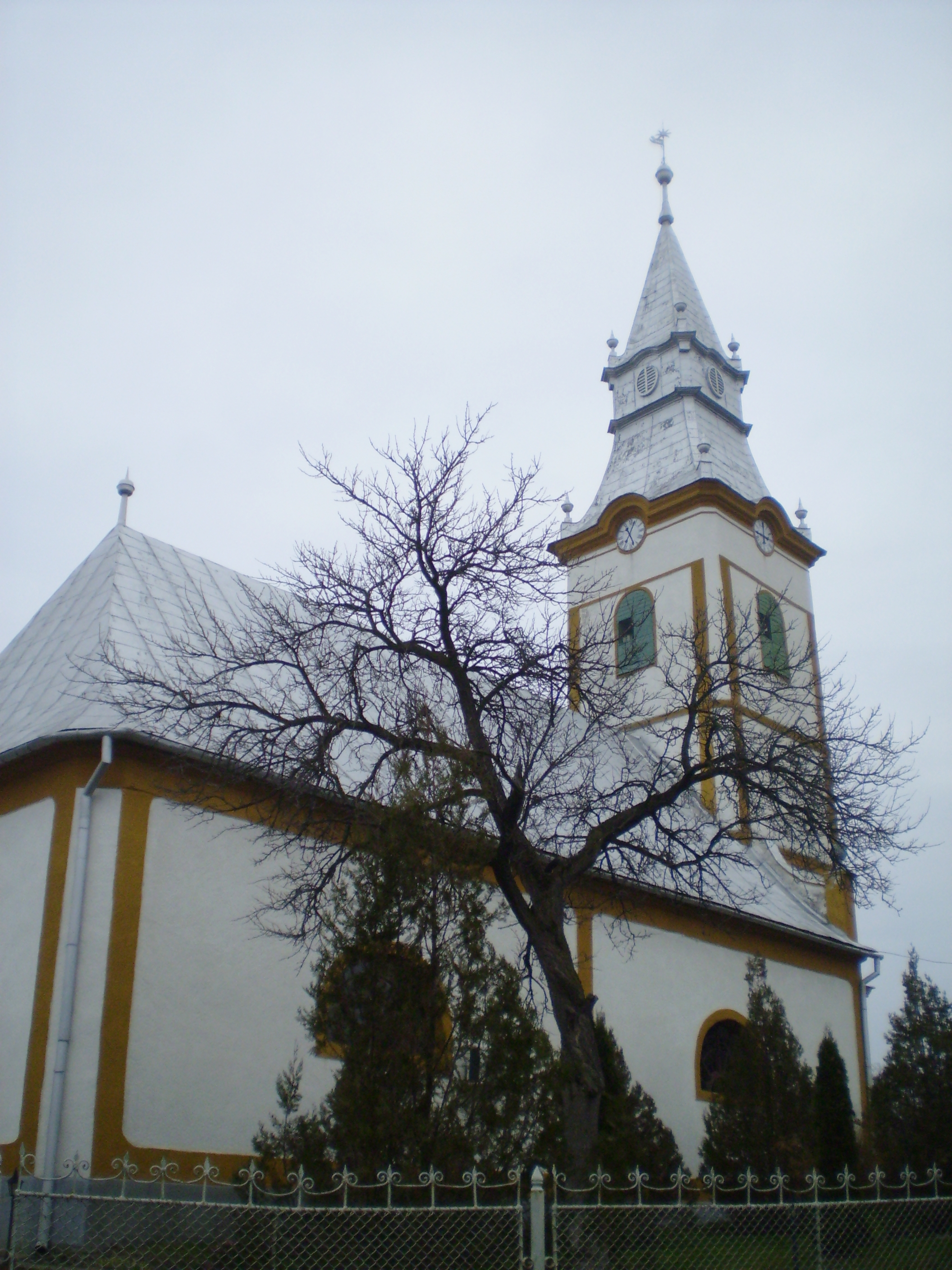 Реформатська церква, 1829 р.